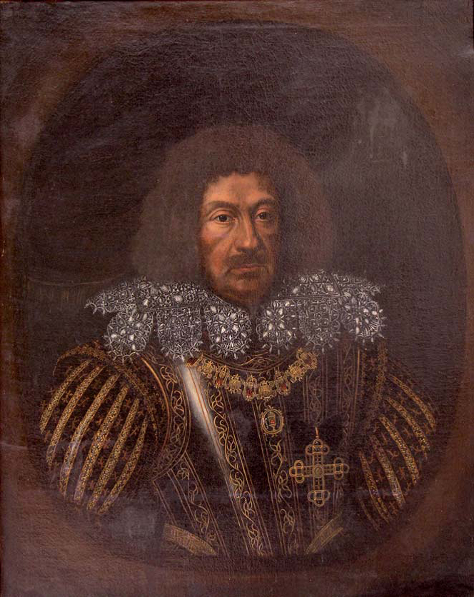 Ritratto di Carlo I Gonzaga Nevers con le onorificenze del Redentore e della Immacolata Concezione